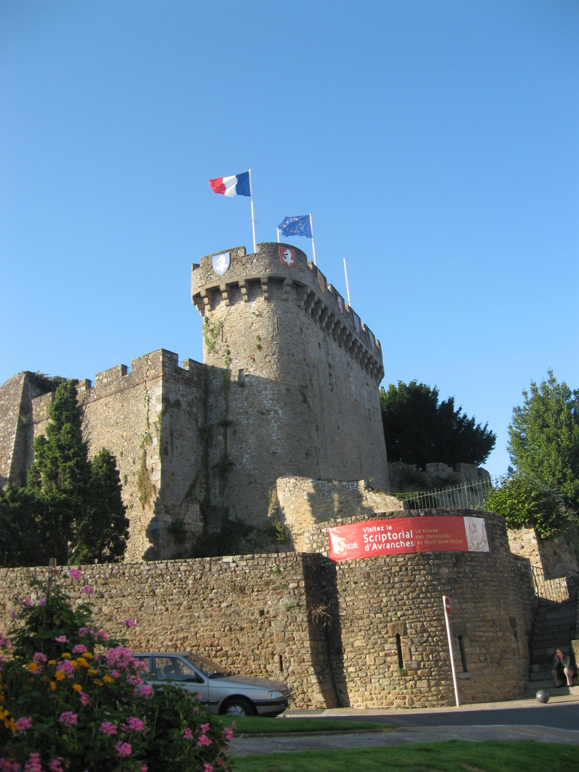 Il dongione del Castello di Avranches, in Bassa Normandia